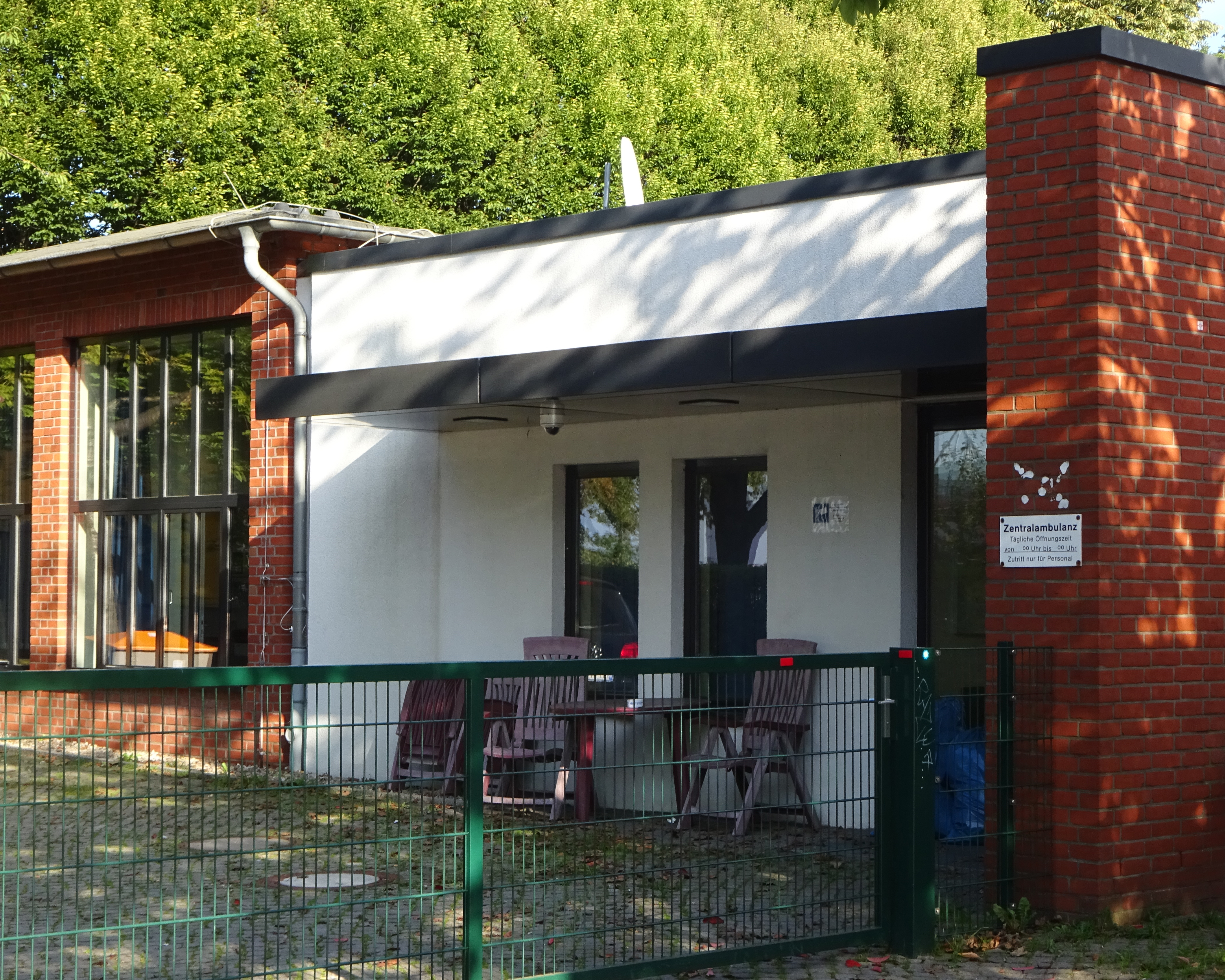 Zentrale Ambulanz für Betrunkene (ZAB) in der ehemaligen Feuerwache Millertor in Hamburg-Neustadt